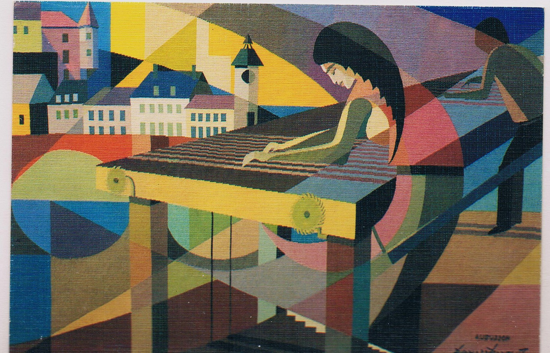 tapisserie Bernard Ronfaut